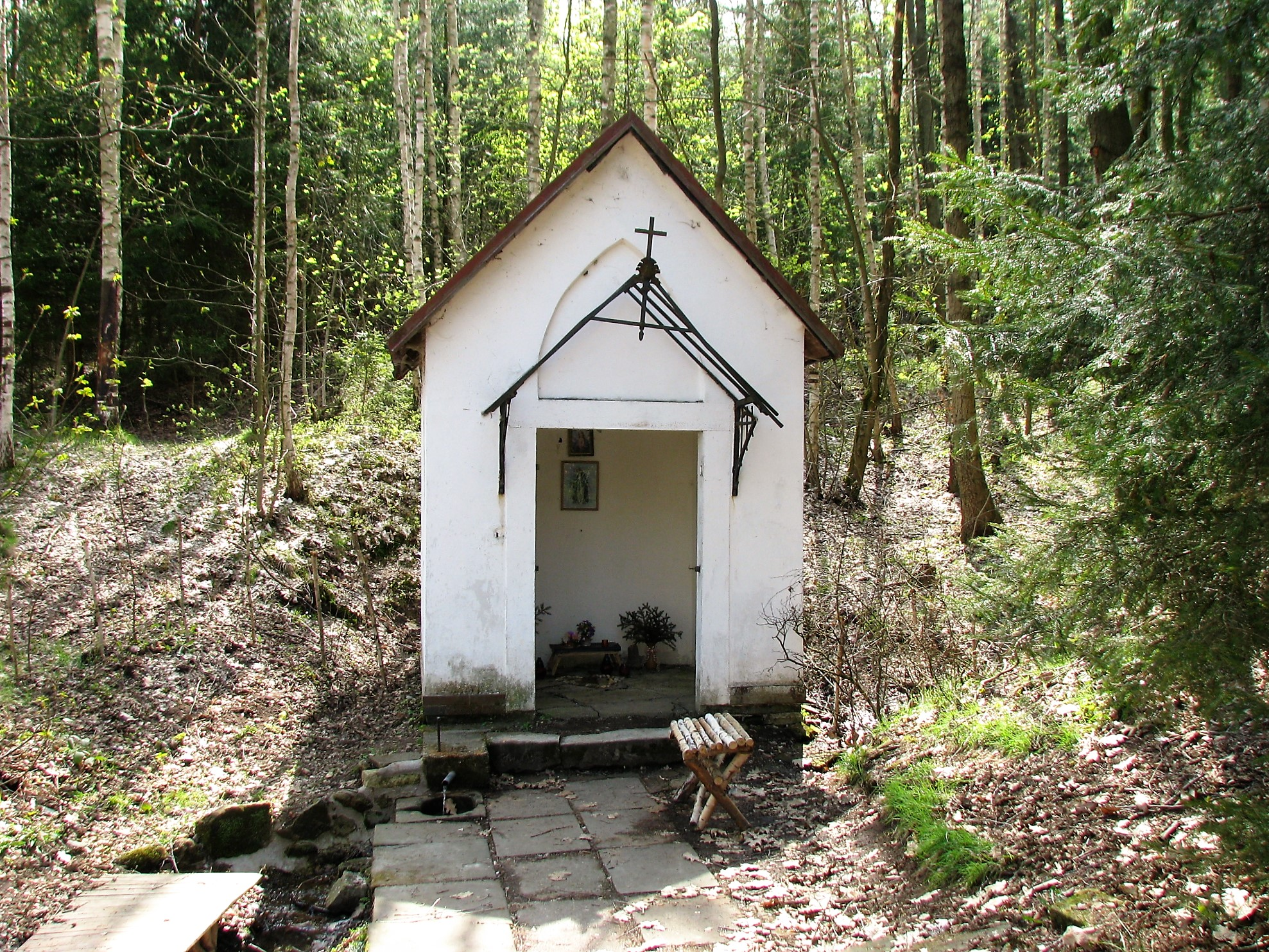 Kaple Panny Marie Pomocné ve Vernéřovicích